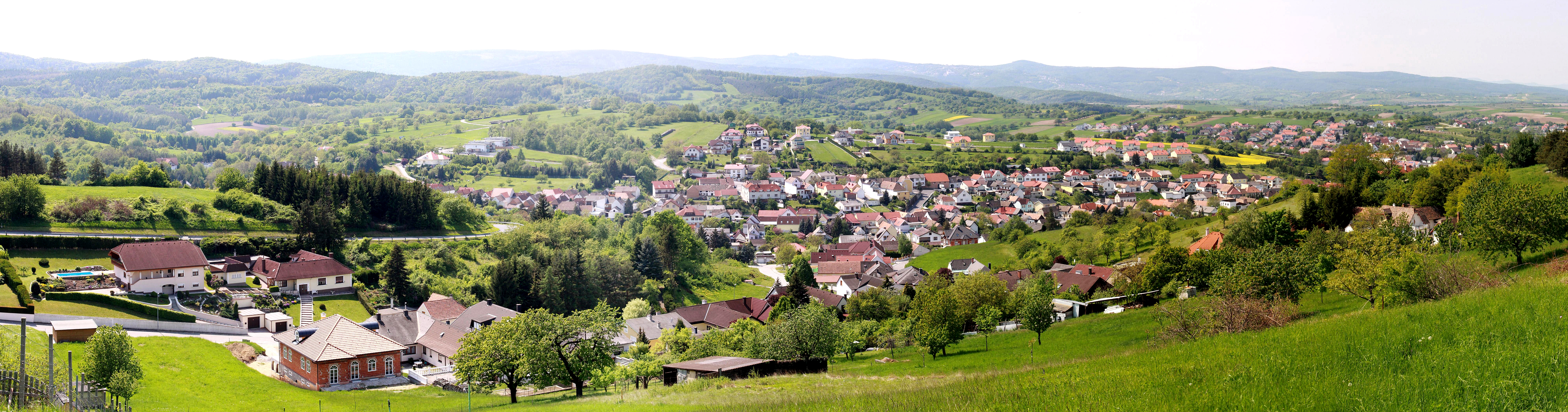 Rohrbach bei Mattersburg - Panoramabild der Gemeinde (zusammengesetzt aus 7 Einzelbildern mit Autostitch)